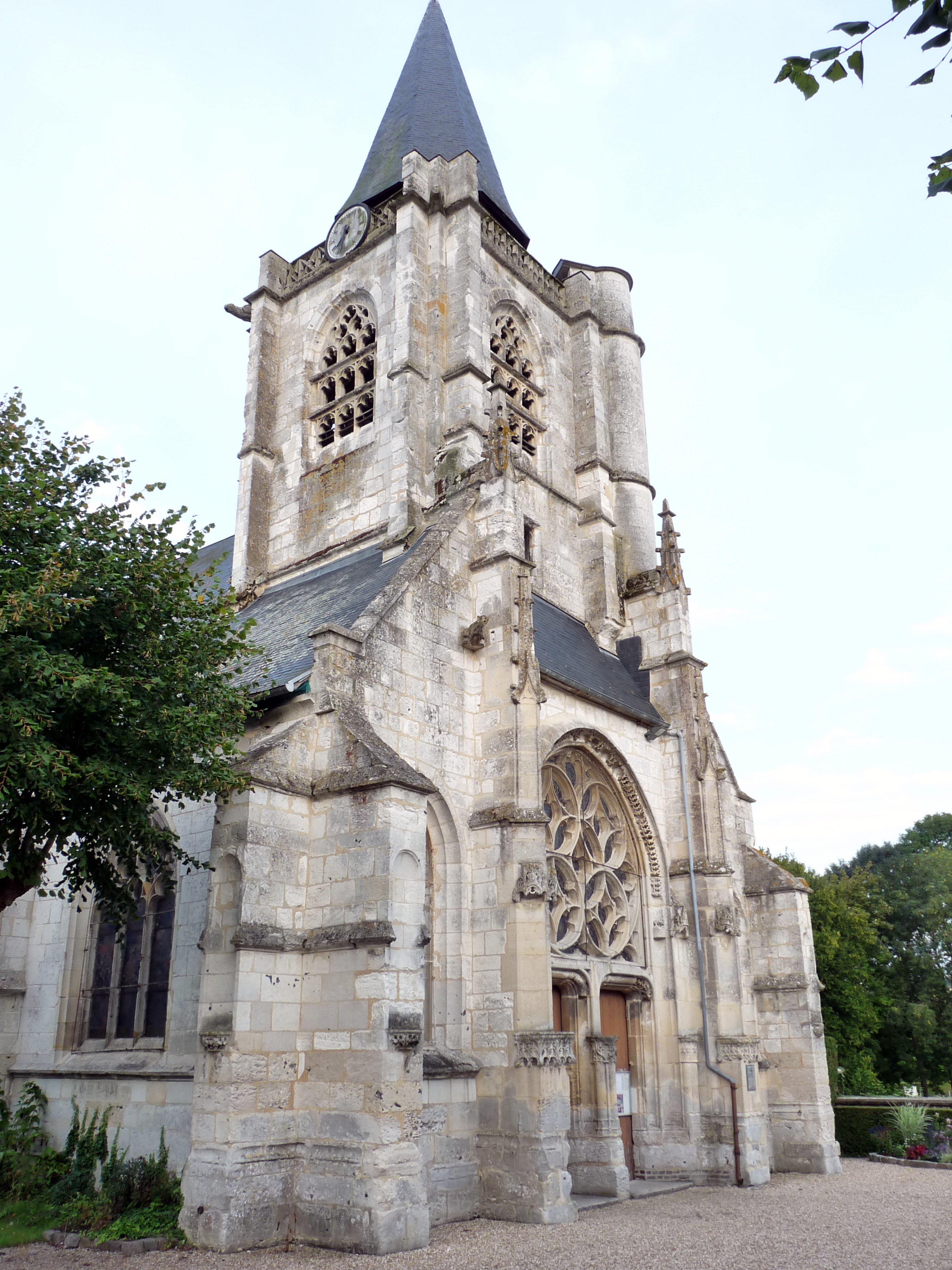 Église Notre-Dame-et-Saint-Mathurin de La Mailleraye-sur-Seine (Inscrit) .